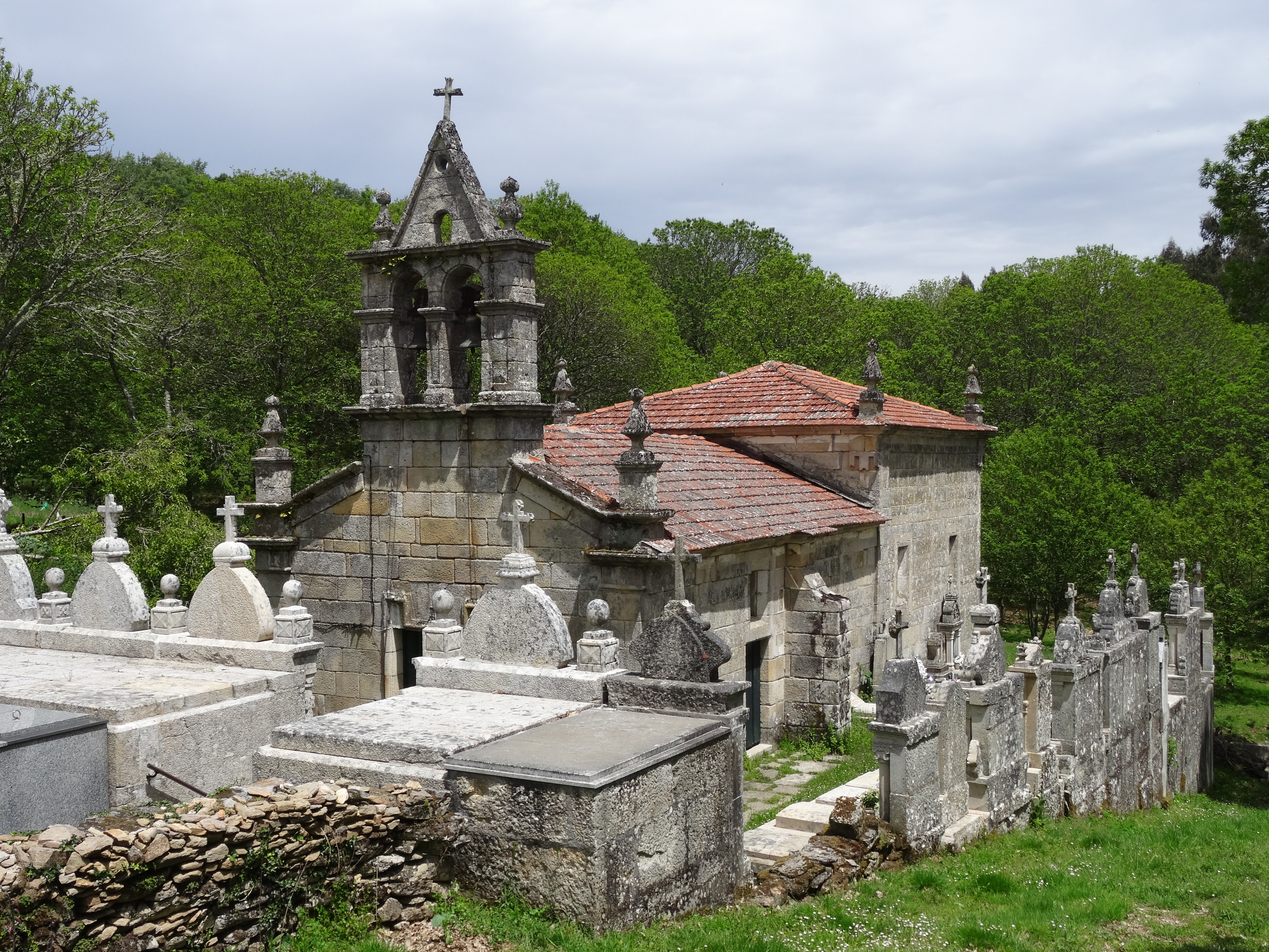 Ver título.